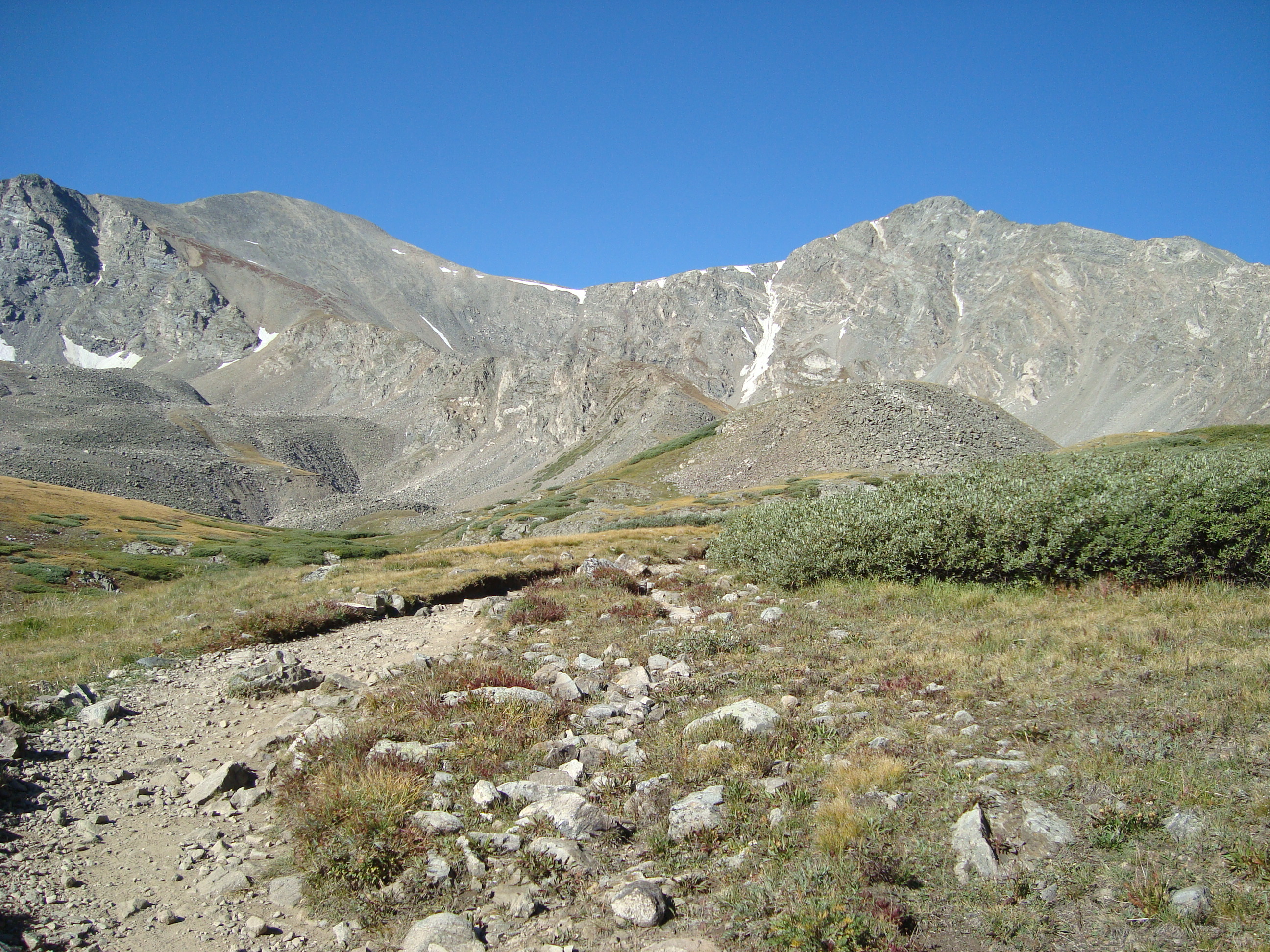 Grays Peak and Torreys Peak, Front Range